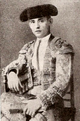 Florentino Ballesteros (Zaragoza,1893 - Madrid, 1917) fue un torero español que cuajó como matador de toros en las temporadas de 1916 y 1917, año en que una grave cornada le produjo la muerte.